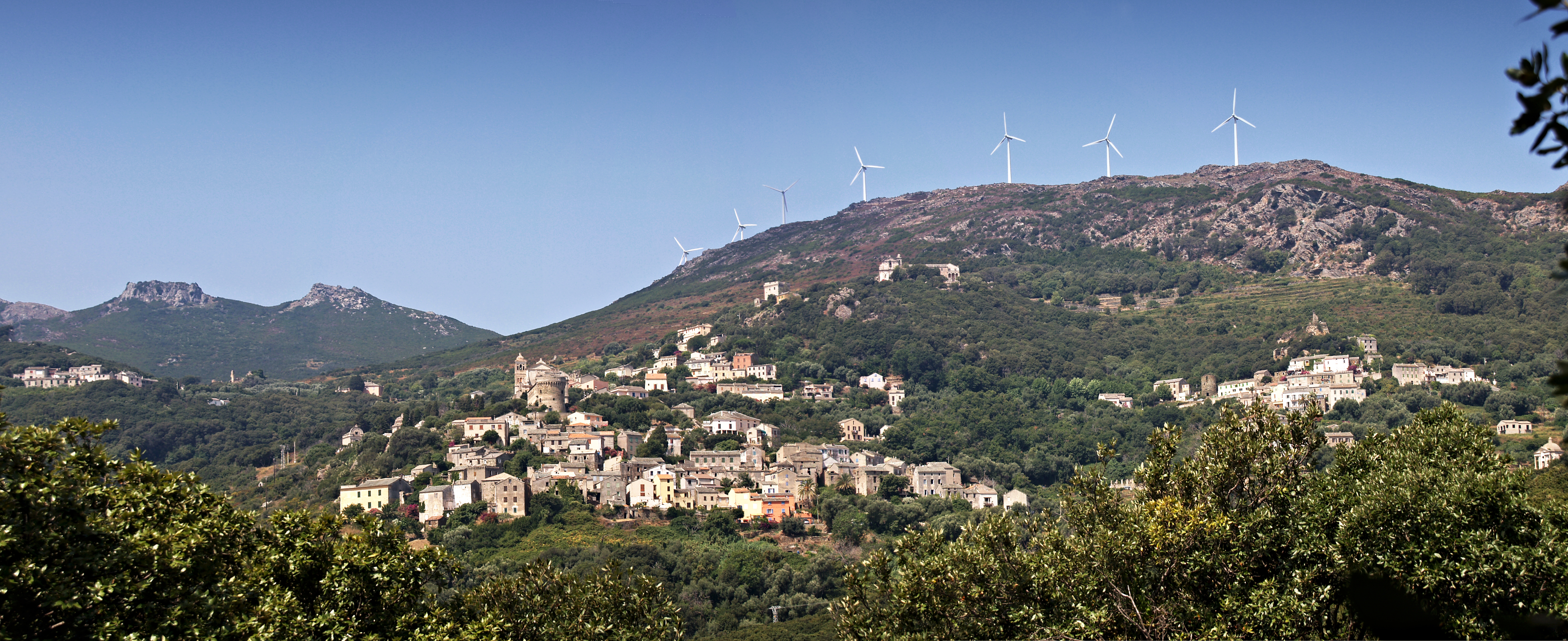 Rogliano (Corse)- Vue d'ensemble de Rogliano village